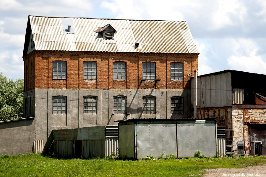 Здание паровой мельницы 1870-1880 годов постройки. Село Жигули. Ставропольский район Самарской области